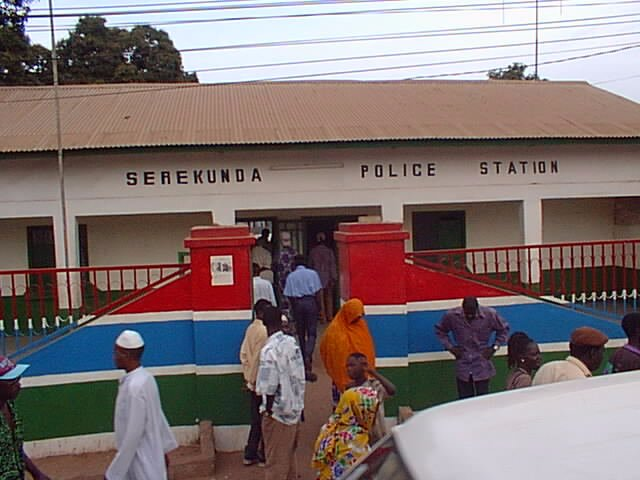 Serekunda Police Station, Gambia